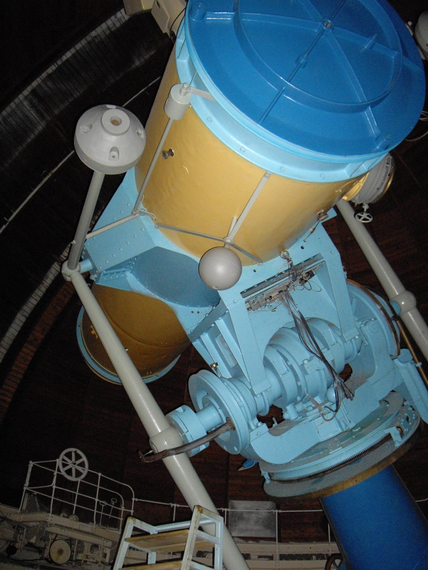 CrAO трофейный 122 cм рефлектор, из Бабельсбергской обсерватории. Carl Zeiss Jena